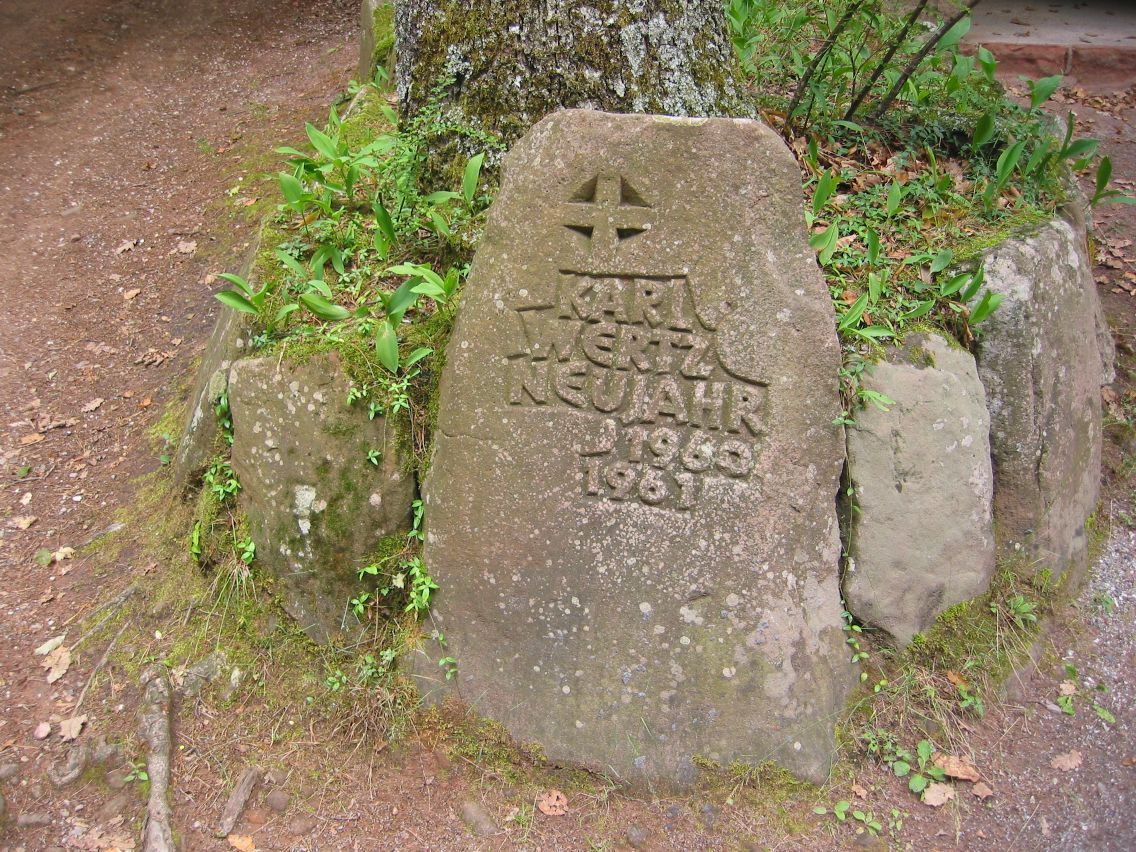 Ritterstein Nummer 190, Karl Wertz Neujahr 1960/1961